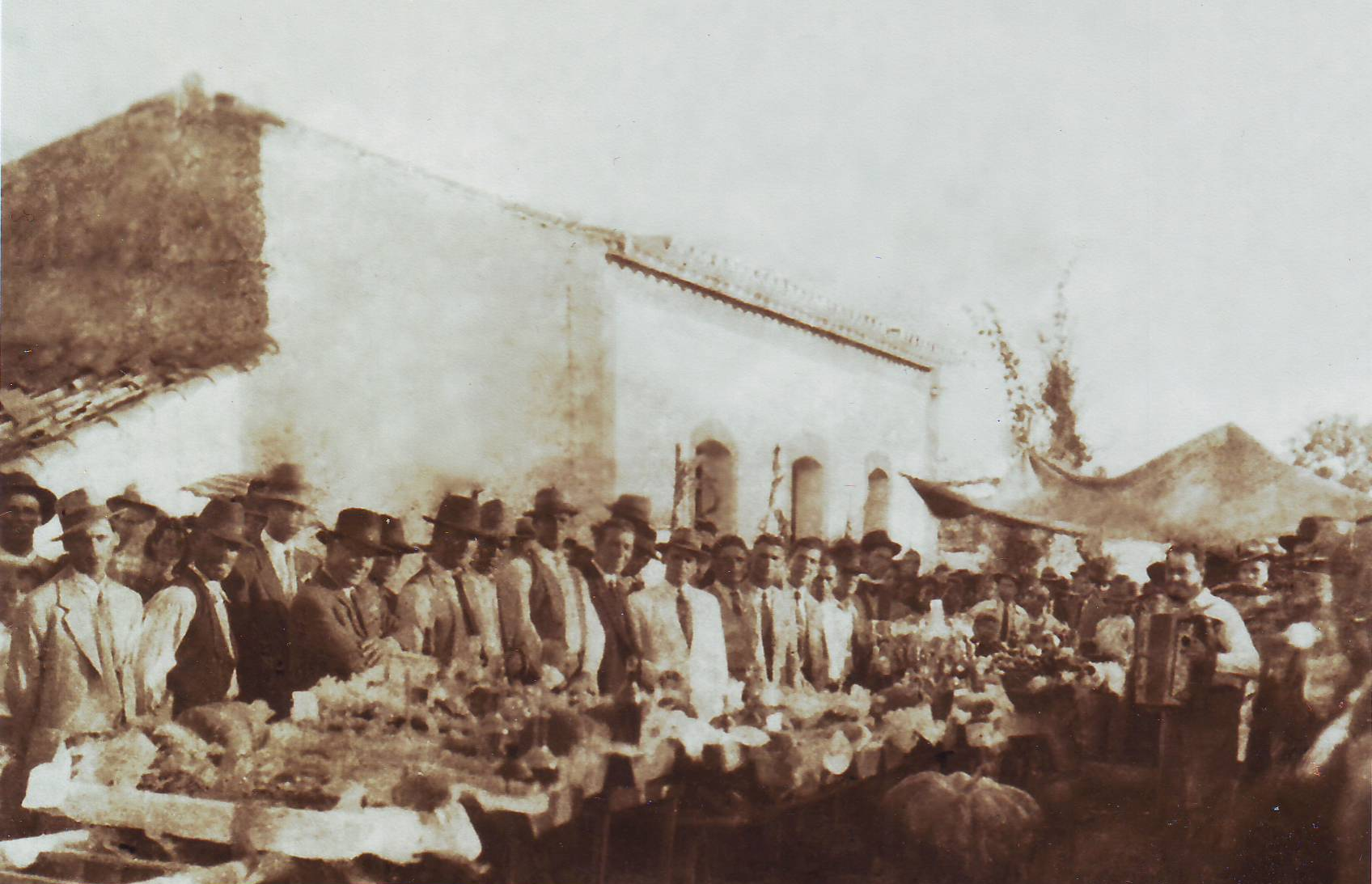 Imagem de José Ferreiro Júnior em plena actuação, algures no Algarve.